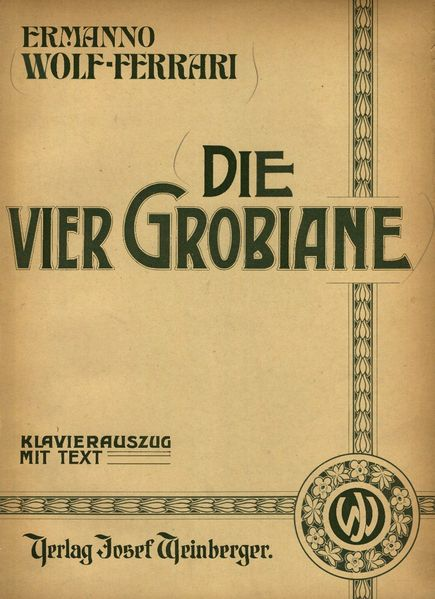 Die Vier Grobiane Titelbild Klavierauszug ca. 1906